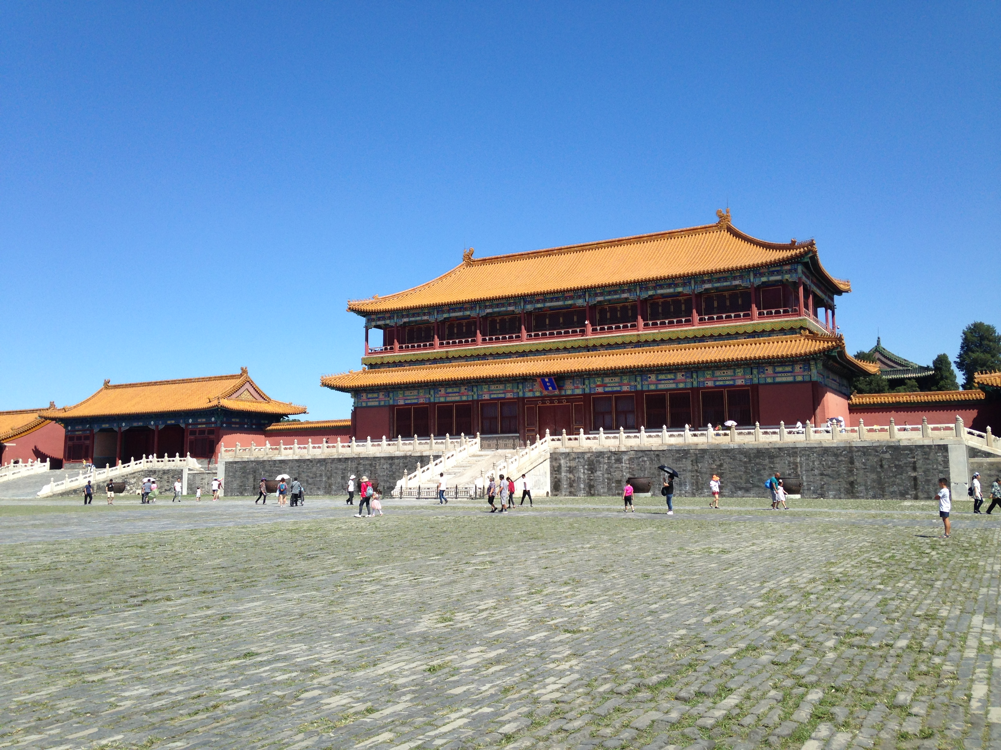 紫禁城・体仁閣